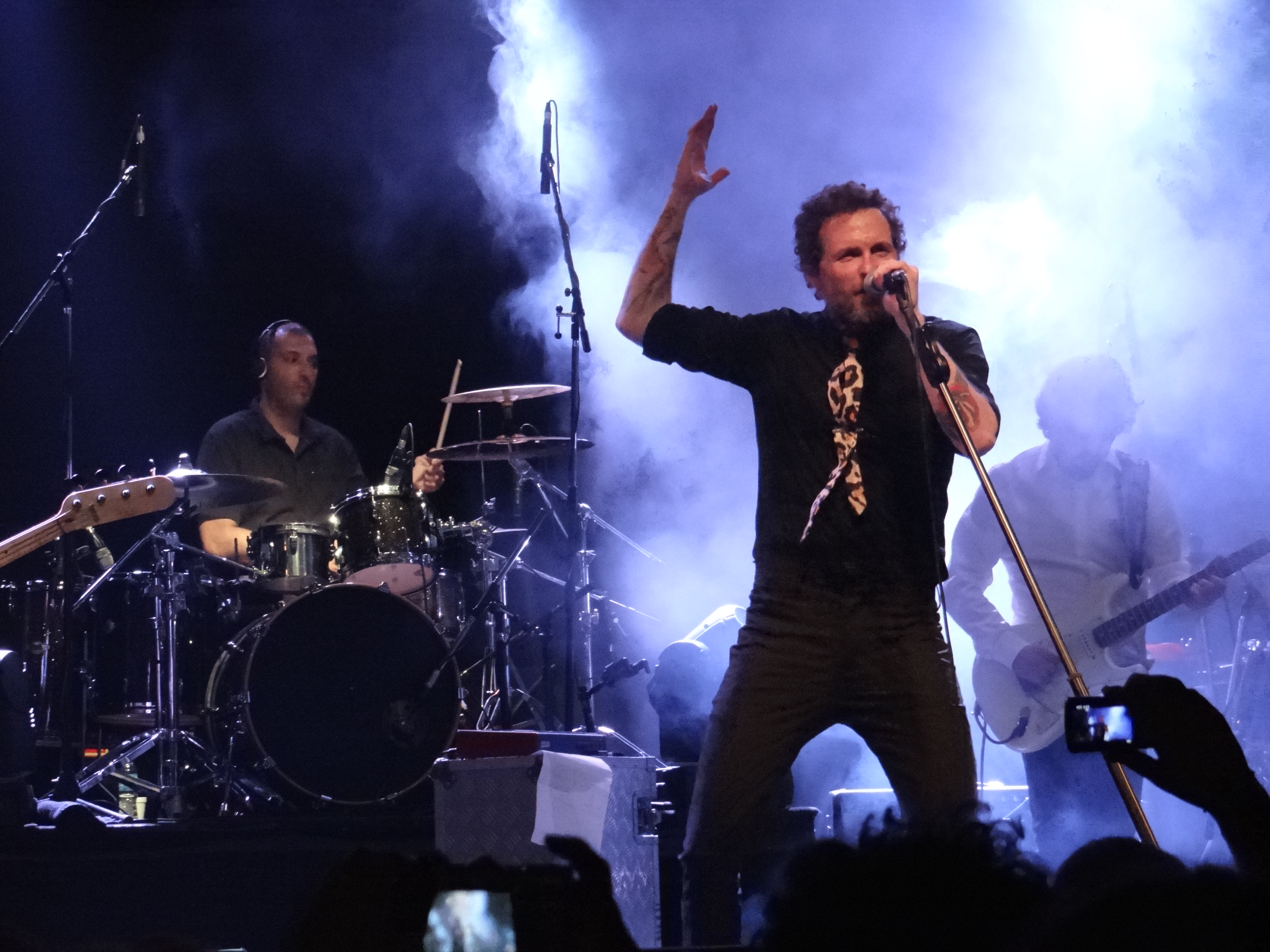 Jovanotti durante uno de los dos shows que dio en Buenos Aires en septiembre de 2013